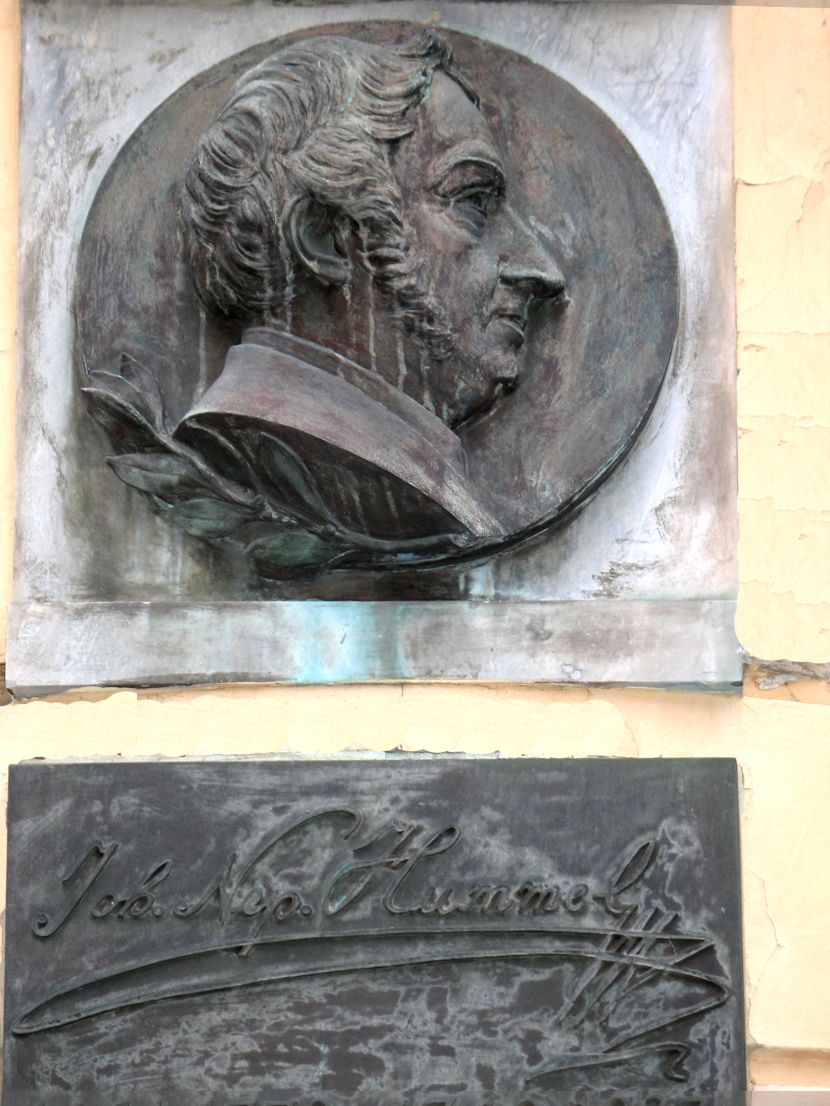 Reliéf Jána Nepomuka Hummela (1778-1837) skladateľa a klaviristu